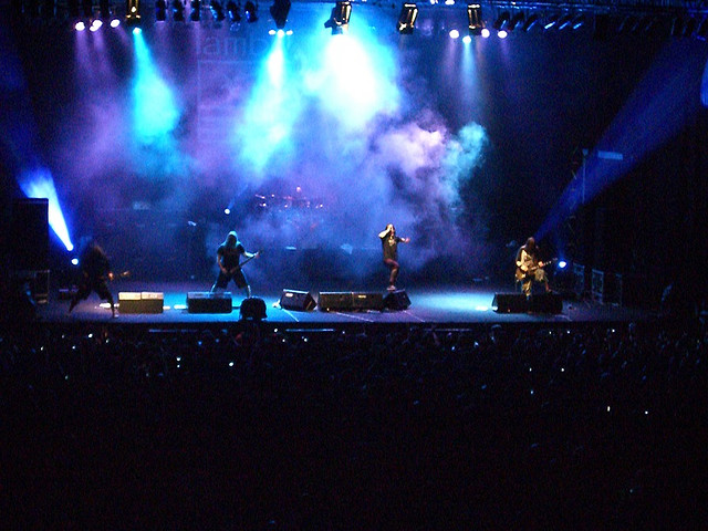 Lamb of God sahnede